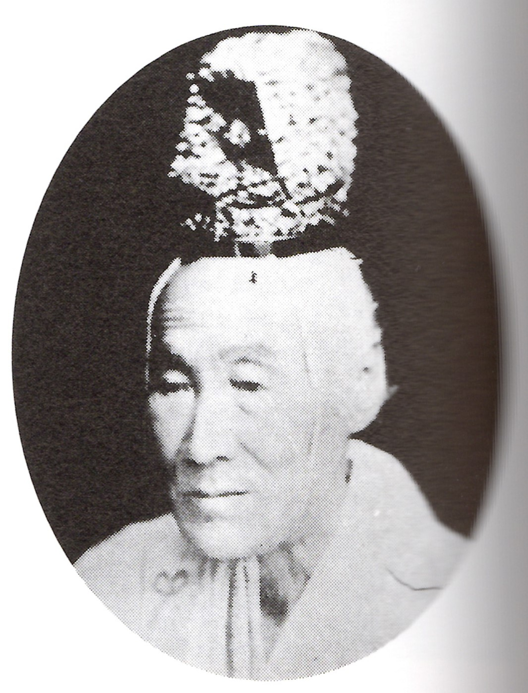 橋本実麗の肖像写真。